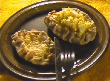 Karelische Pastete, eine finnische Spezialität.